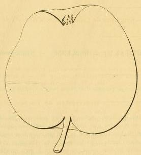 Adams Pearmain, forme du fruit, Dictionnaire de pomologie d'André Leroy, 1873, p.52.